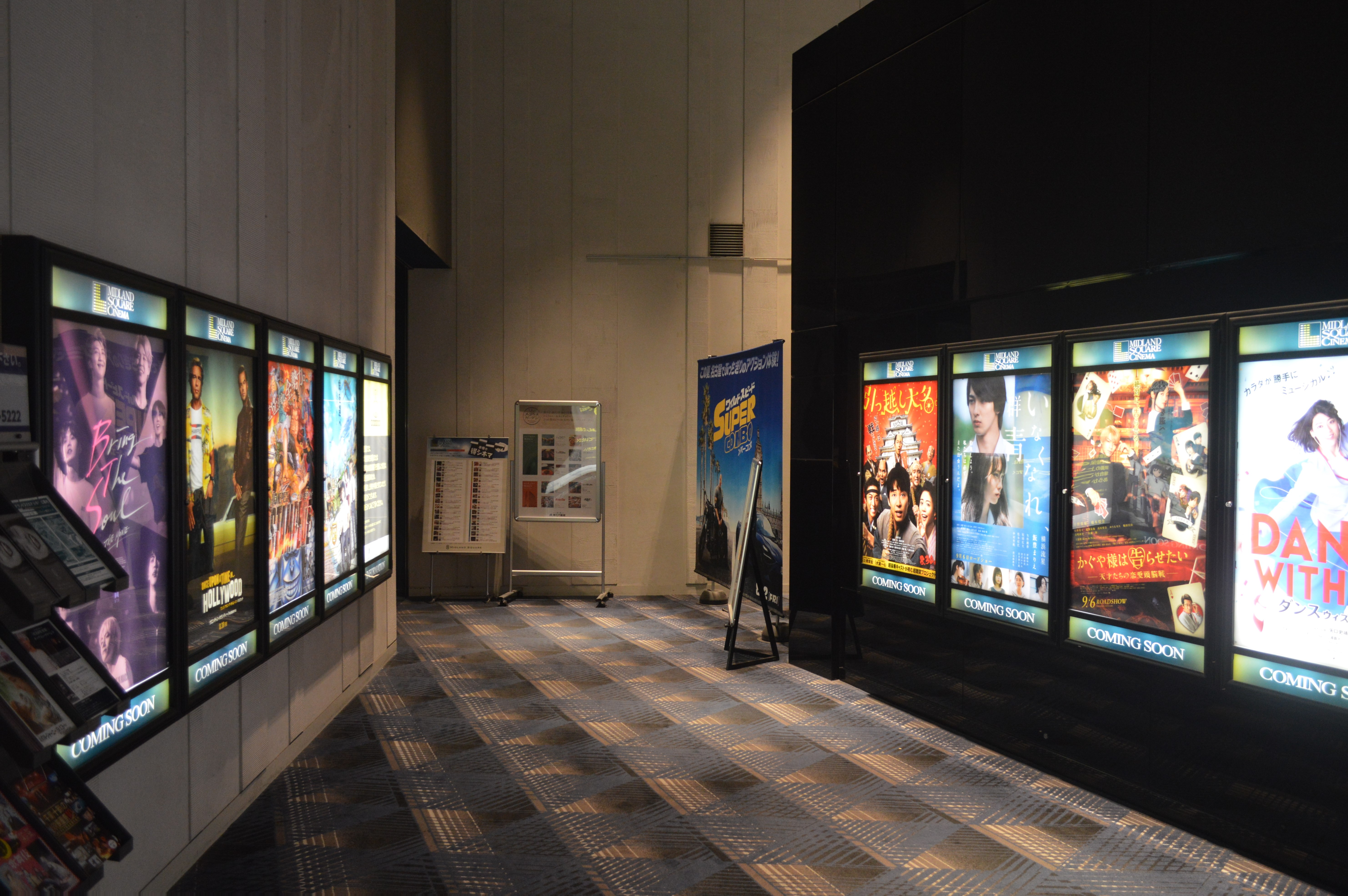 愛知県名古屋市中村区名駅4丁目7-1のミッドランドスクエア5階にある映画館「ミッドランドスクエアシネマ」。